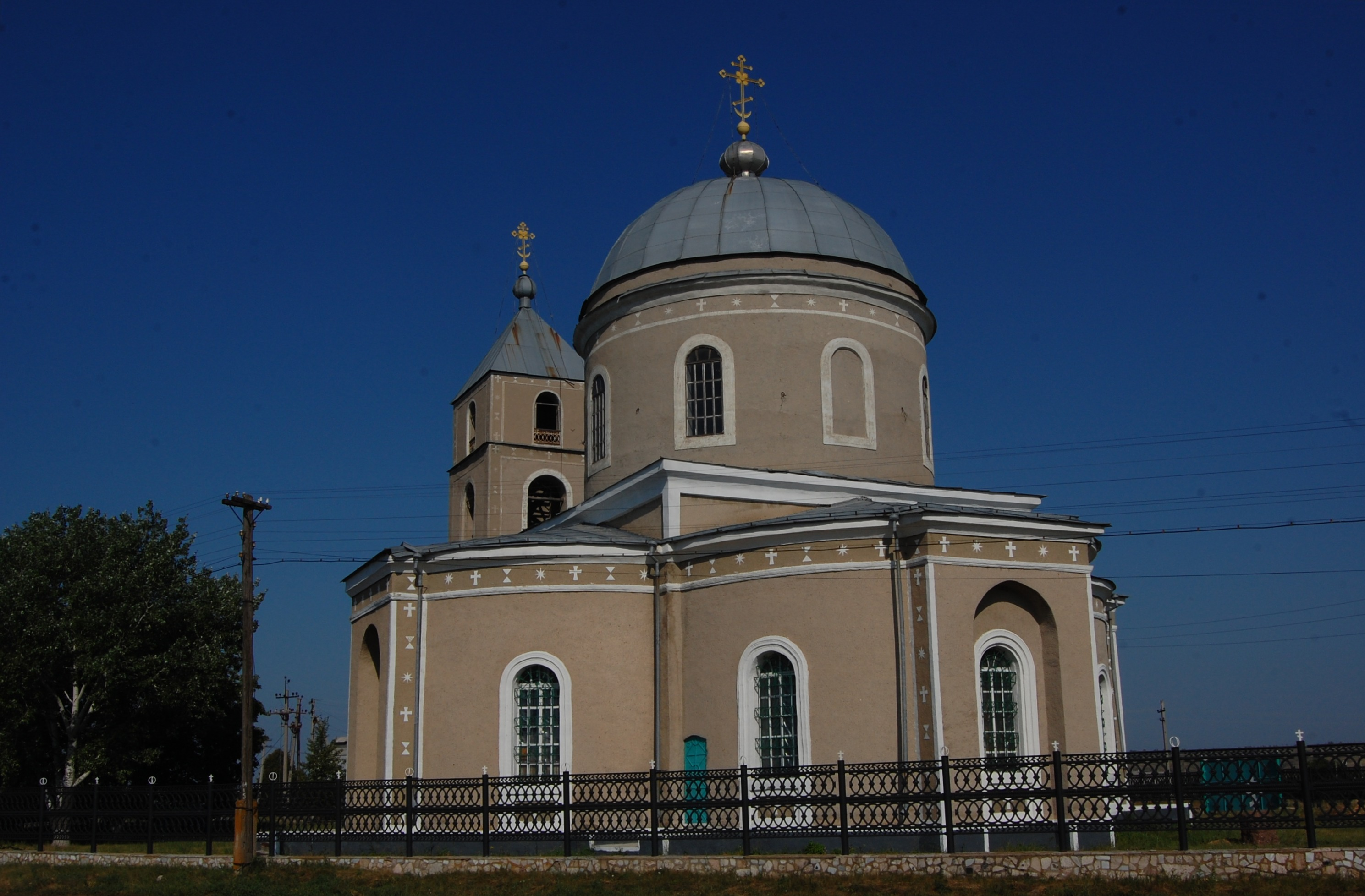 Новопсковський район, Луганська область